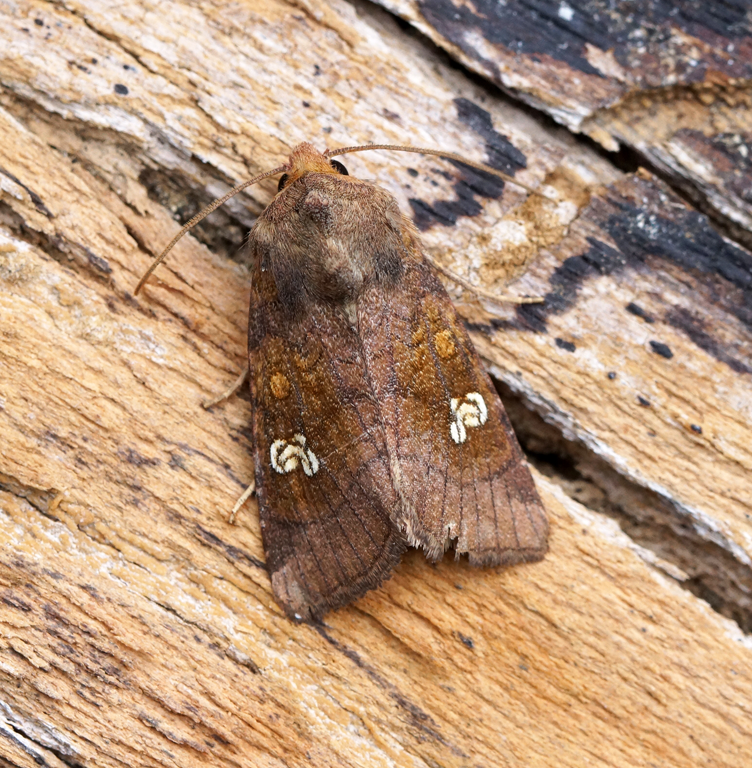 Travařka polní